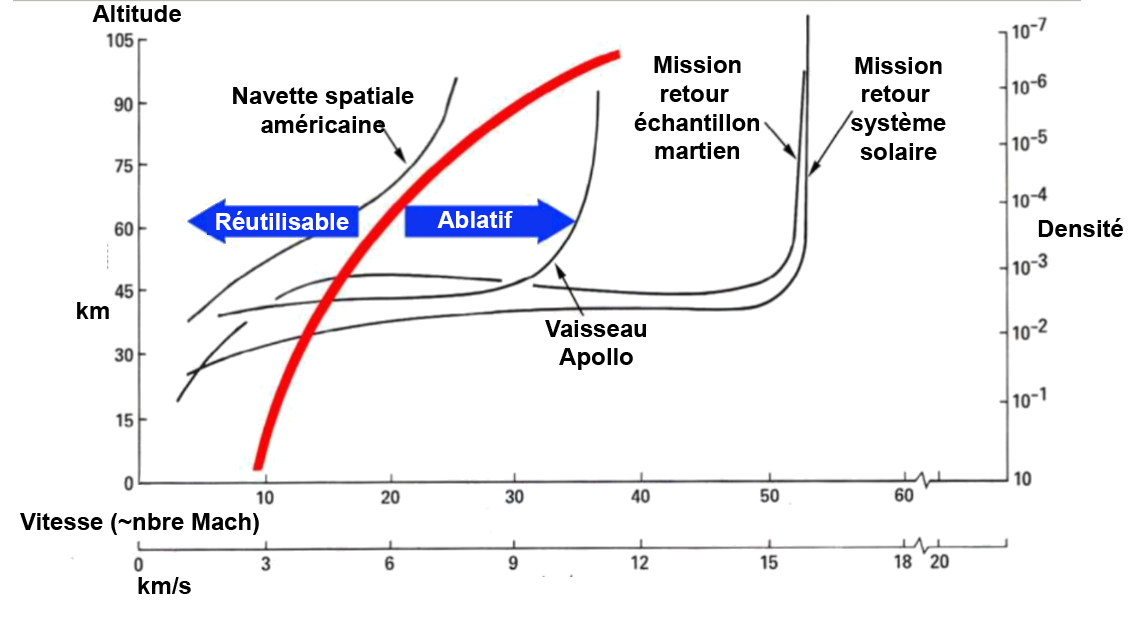 Bouclier-thermique-ablatif-vs-réutilisable-pour-un-retour-sur-Terre